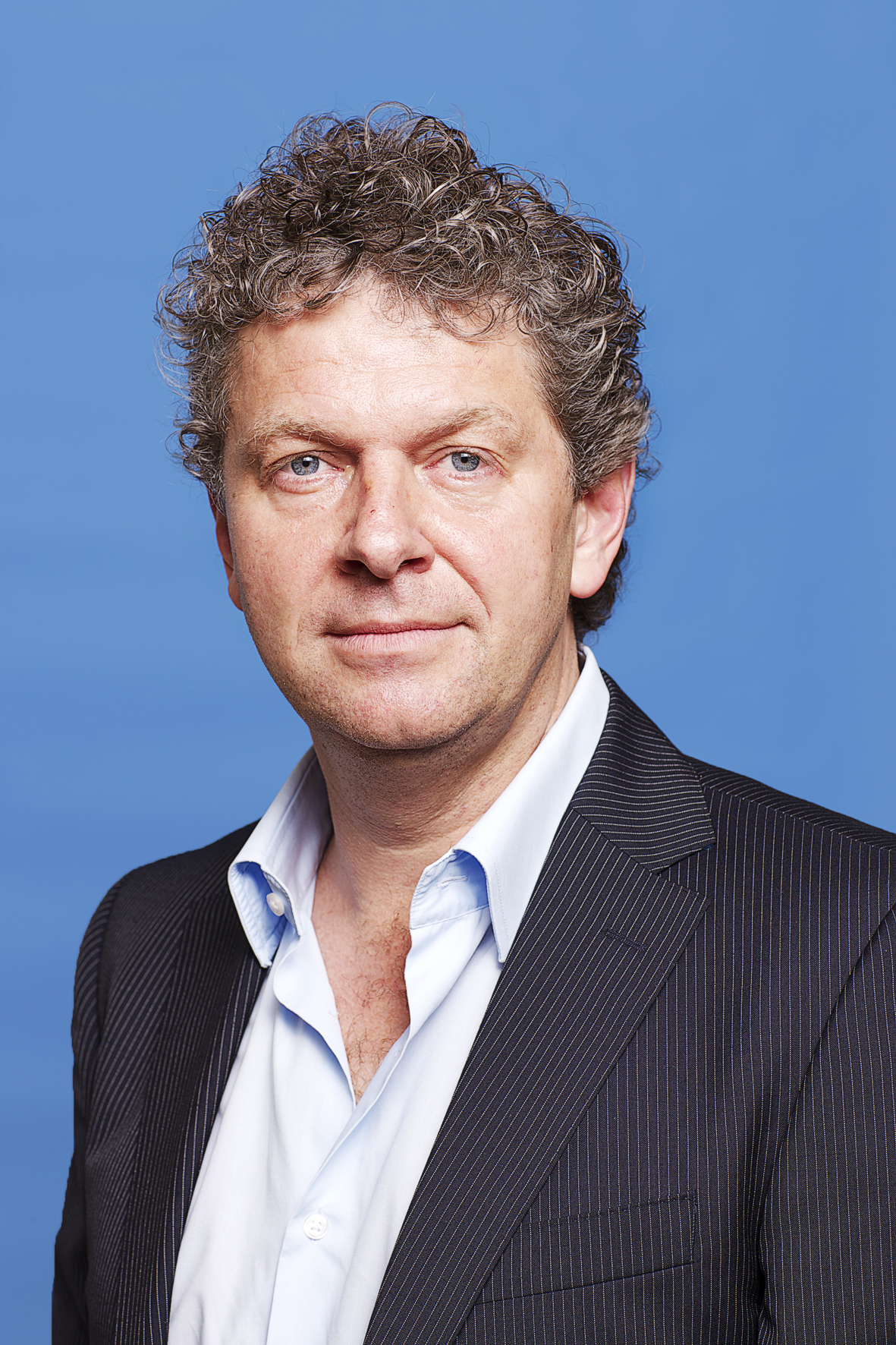 Jacques Monasch, Tweede Kamerlid. Foto: Lex Draijer.